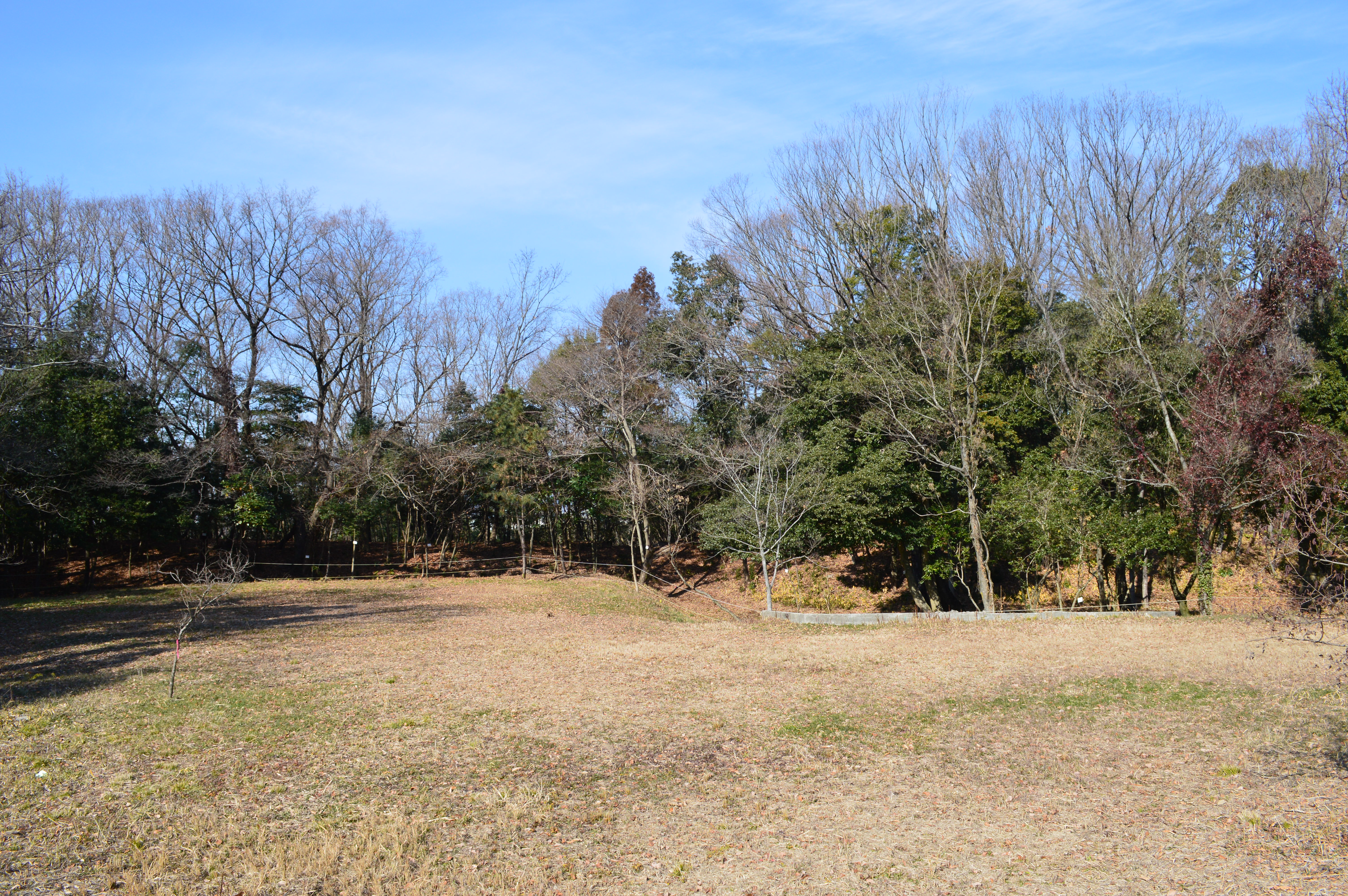 白鳥塚古墳 (名古屋市) 全景